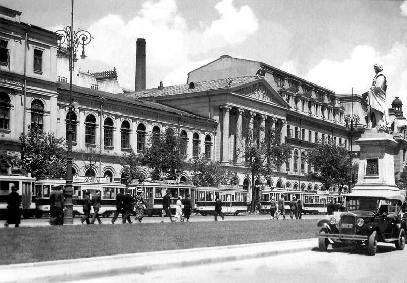 Universitatea din Bucuresti